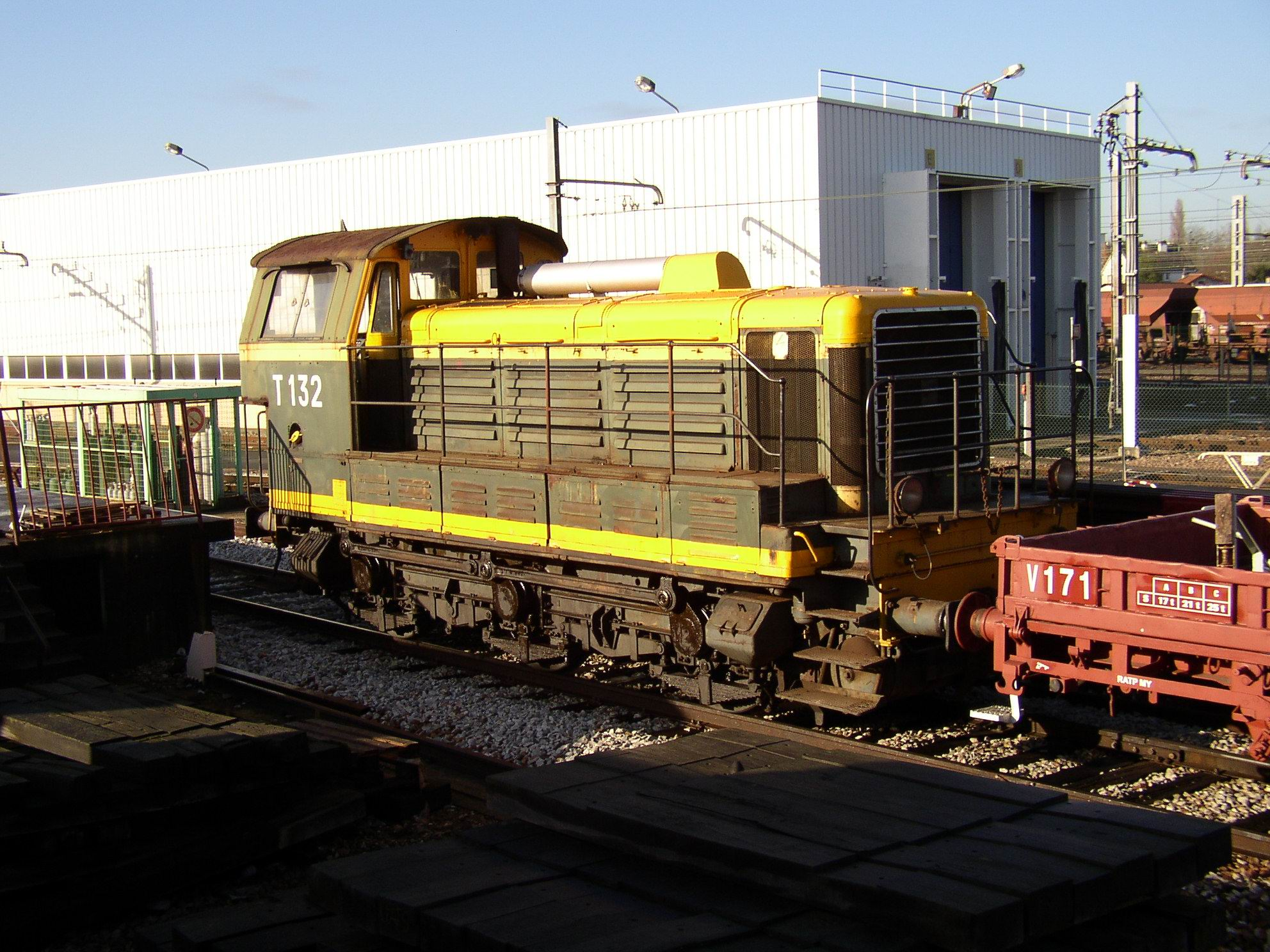 La dernière 61000 de la RATP encore en service en 2012 sur le parc de triage de MASSY-PALAISEAU RER B. La T132